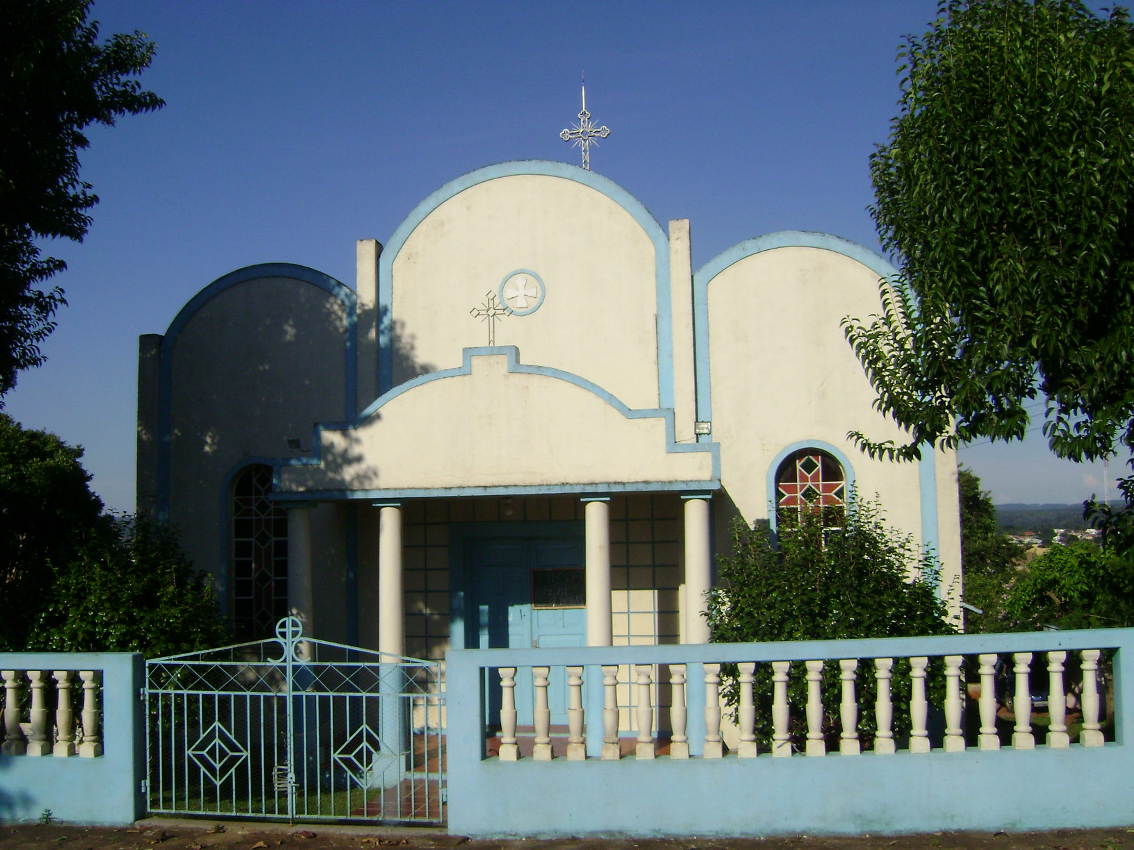 Igreja da comunidade greco-católica ortodoxa de rito ucraniano, capela São José Operário, localizada no bairro Alto das Oliveiras, em Telêmaco Borba, no Paraná.